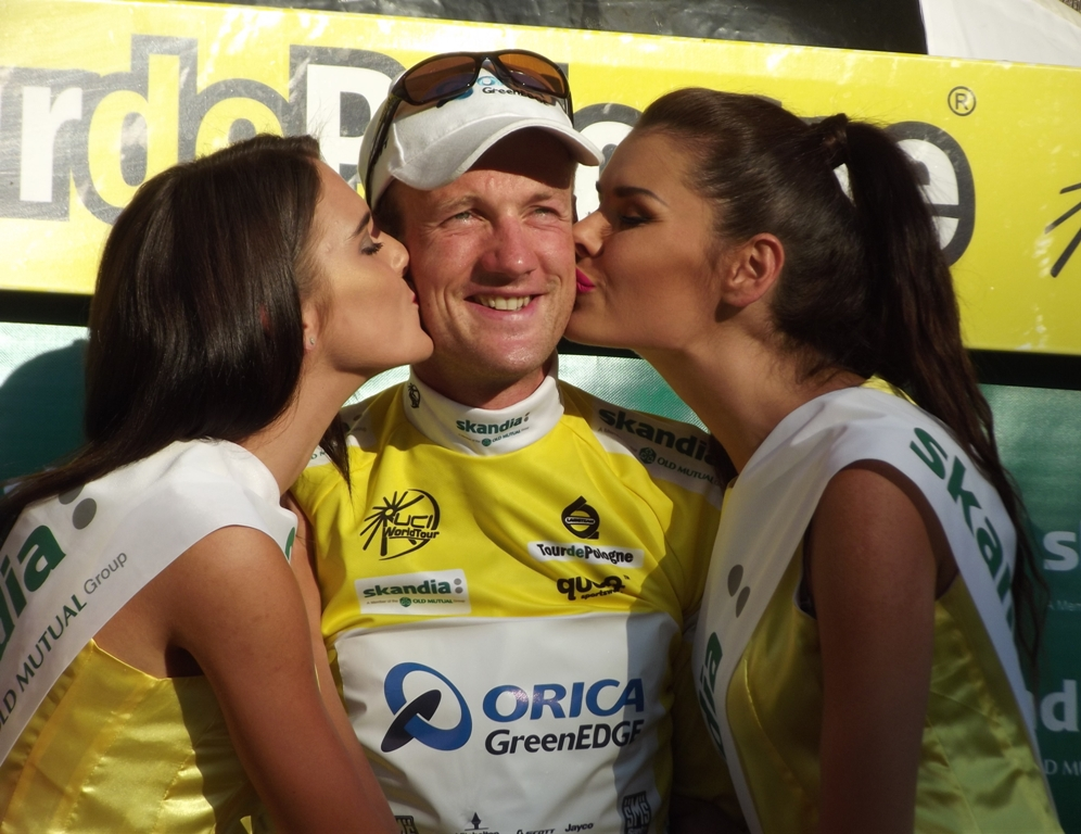 Zdjęcie zrobione podczas VII etapu 70. jubileuszowego Tour de Pologne w Krakowie.